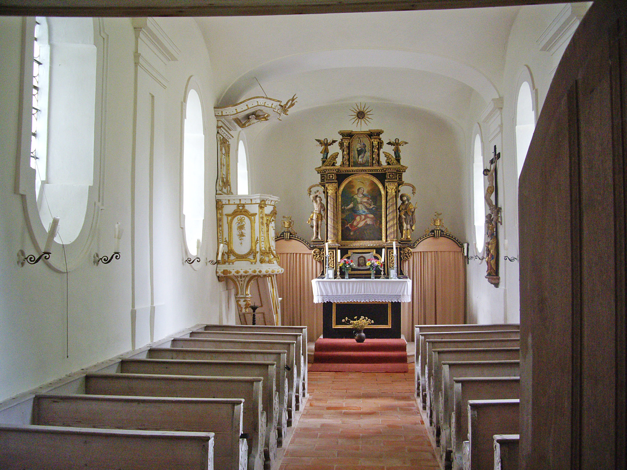 Innenraum der Kapelle Sankt Margareth, Zwergern-Halbinsel, Walchensee, Kreis Bad Tölz.